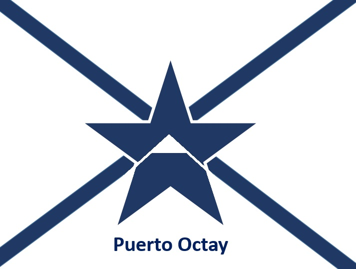 Bandera Puerto Octay